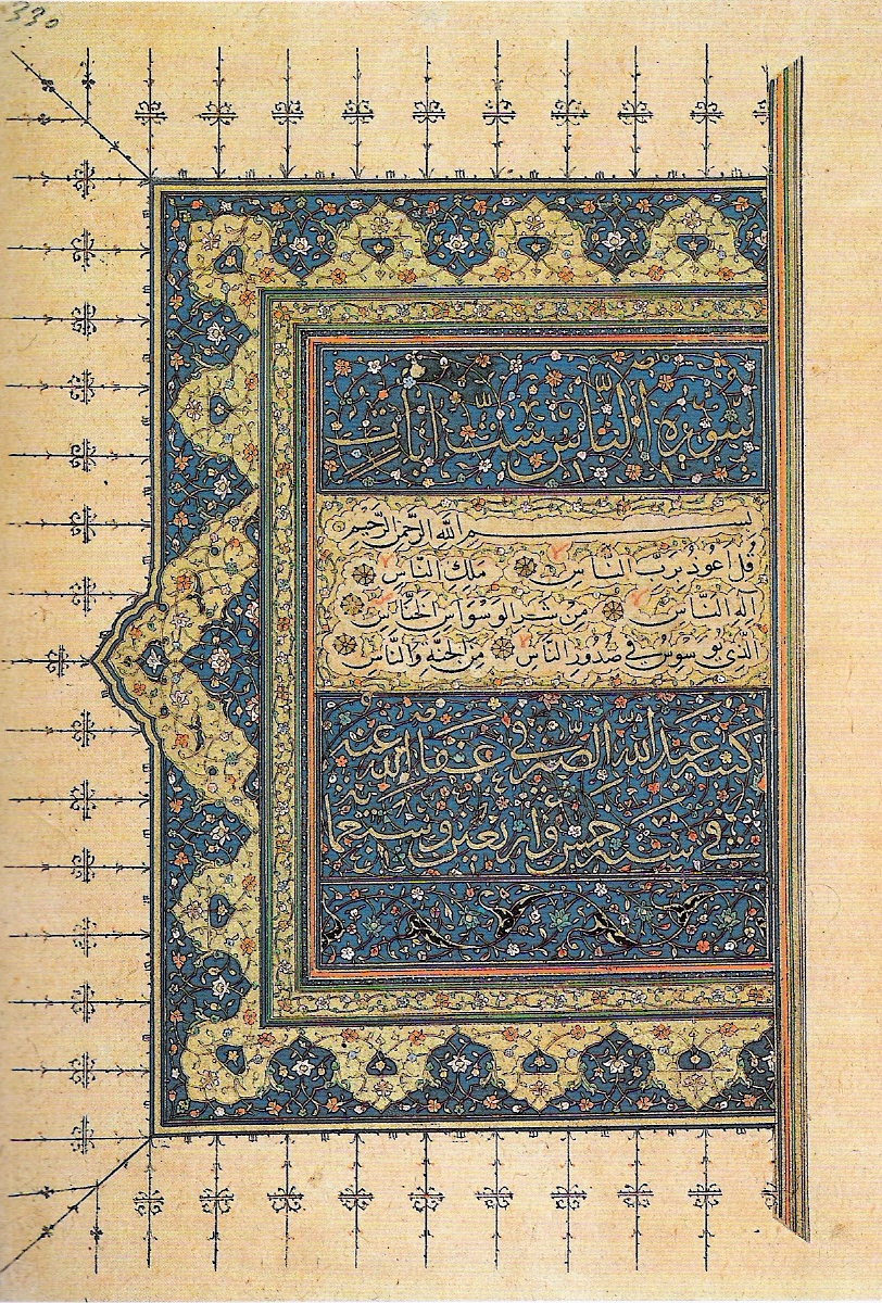 Illuminiertes Blatt aus einem Koran, der für den osmanischen Großwesir Rüstem Pascha angefertigt wurde. Siehe: Schätze aus dem Topkapi-Serail. Berlin:Reimer, 1988, ISBN 3-496-01050-9, S. 95 f.